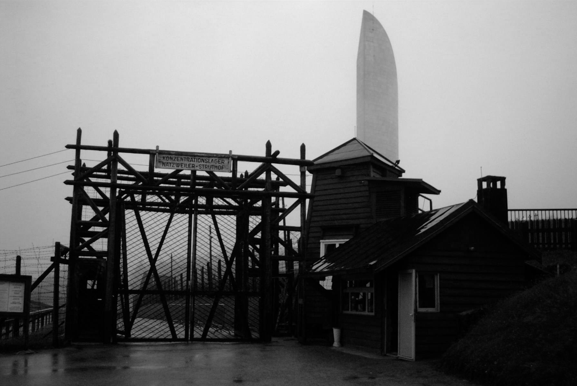 Entrée du camp de concentration du Struthof, en Alsace. En arrière plan se dresse le monument érigé à la mémoire des victimes du nazisme. Photographie prise par un jour de brouillard de juillet 2001 par Medy Sejai.